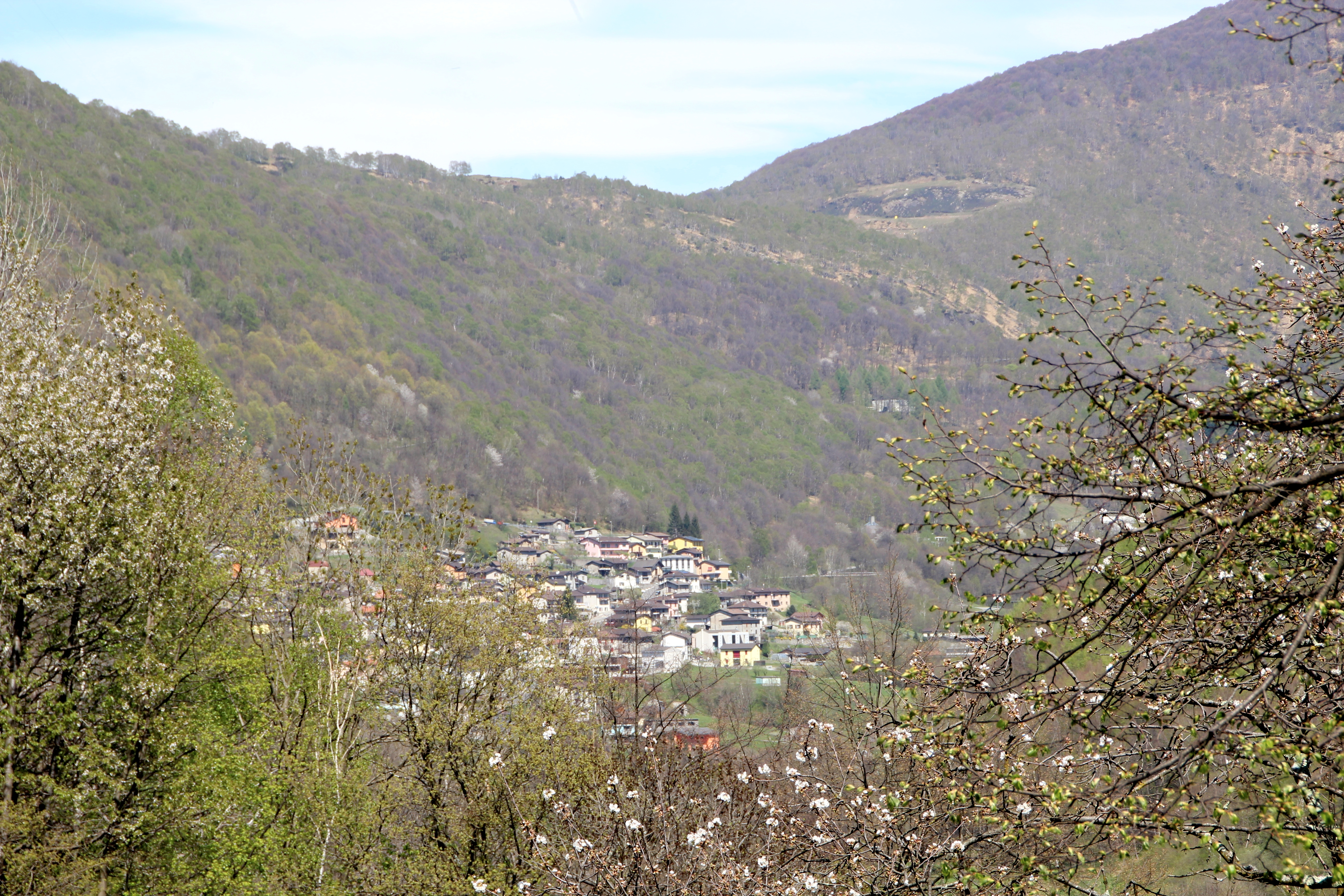 Isone